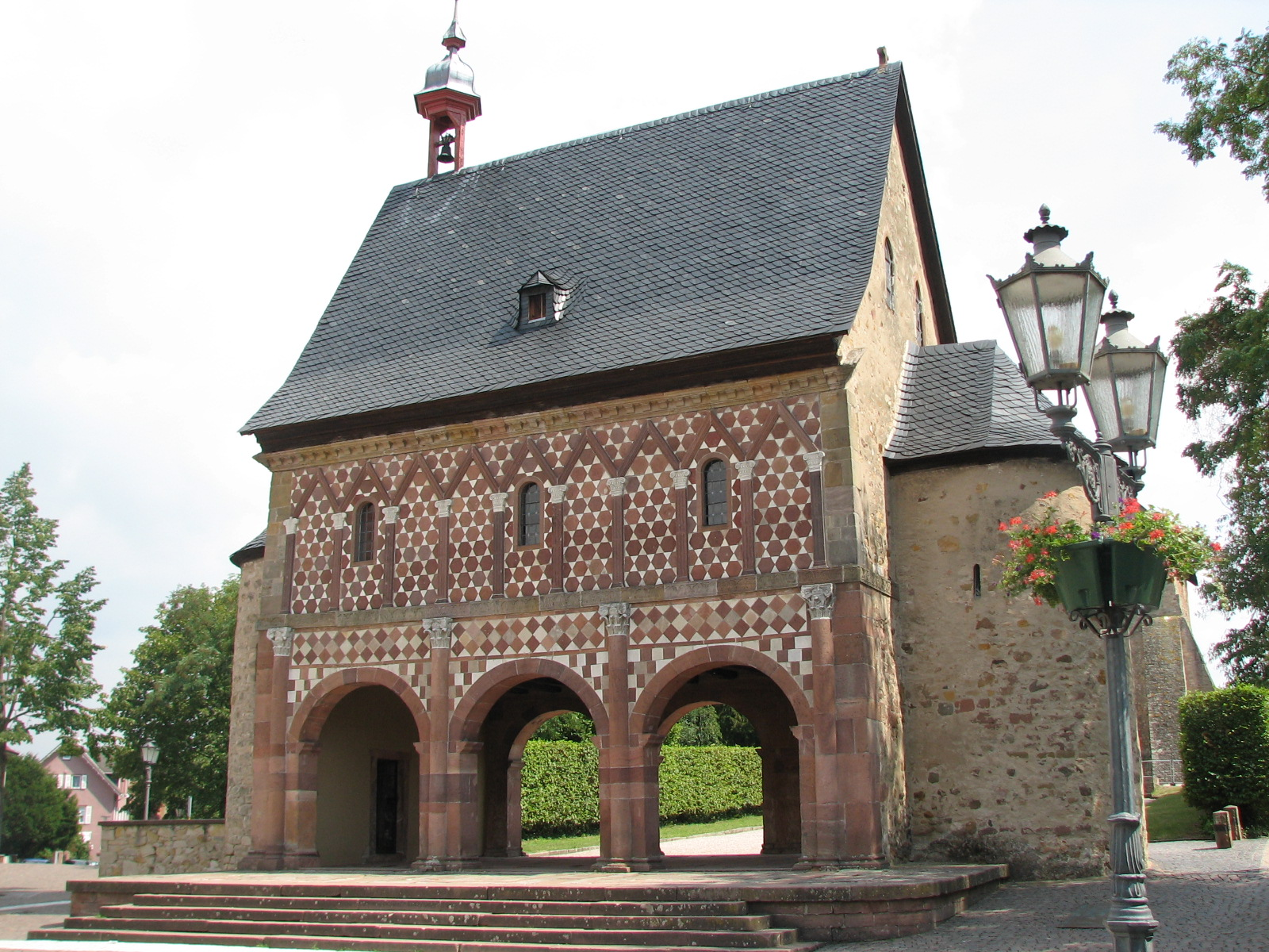 Toegangspoort tot de abdij van Lorsch